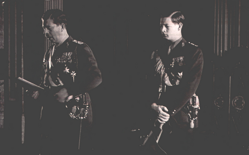 Carol II și fiul său Mihai